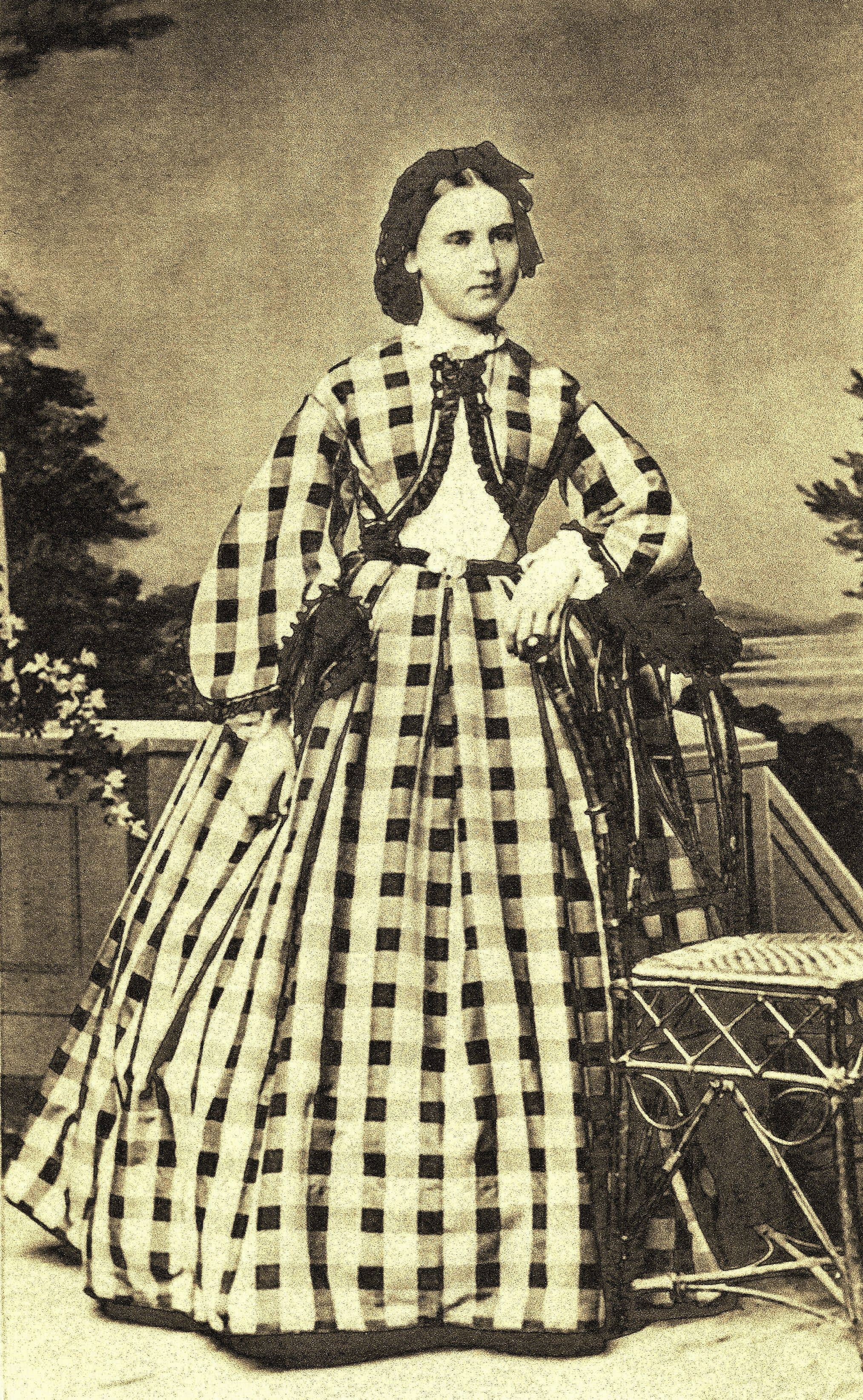 Sophie Friederike Haug (* 4. September 1843; † 24. Juni 1937), sechste Tochter von Karl Friedrich Haug und Ehefrau von Oskar von Bülow